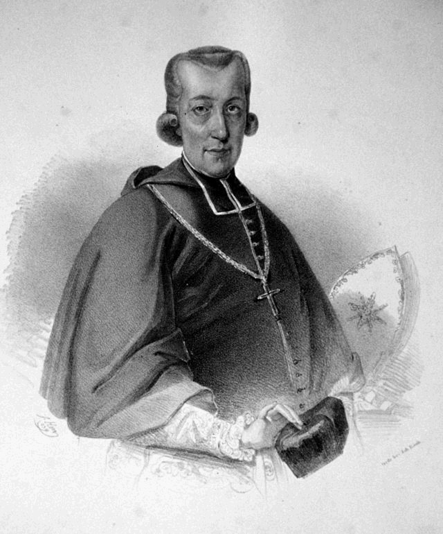 Johann Leopold Hay, Lithografie od Faustina Herra, 1839